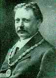 Josef Theurer (1862 - 1927), Český fyzika a matematik.